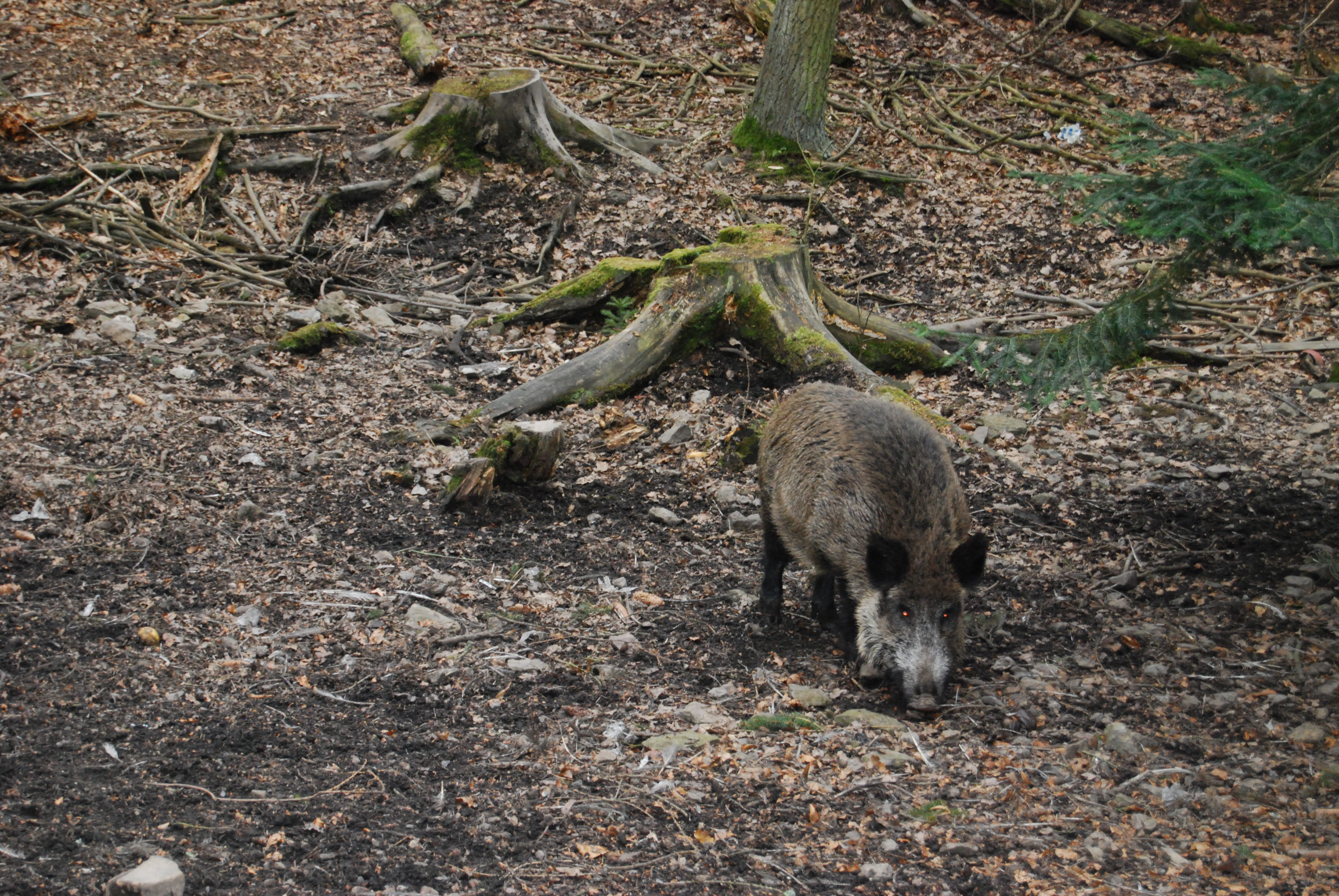 Prase divoké (Sus scrofa) v oboře Hůrka. Smrkovice. Okres Písek. Česká republika.